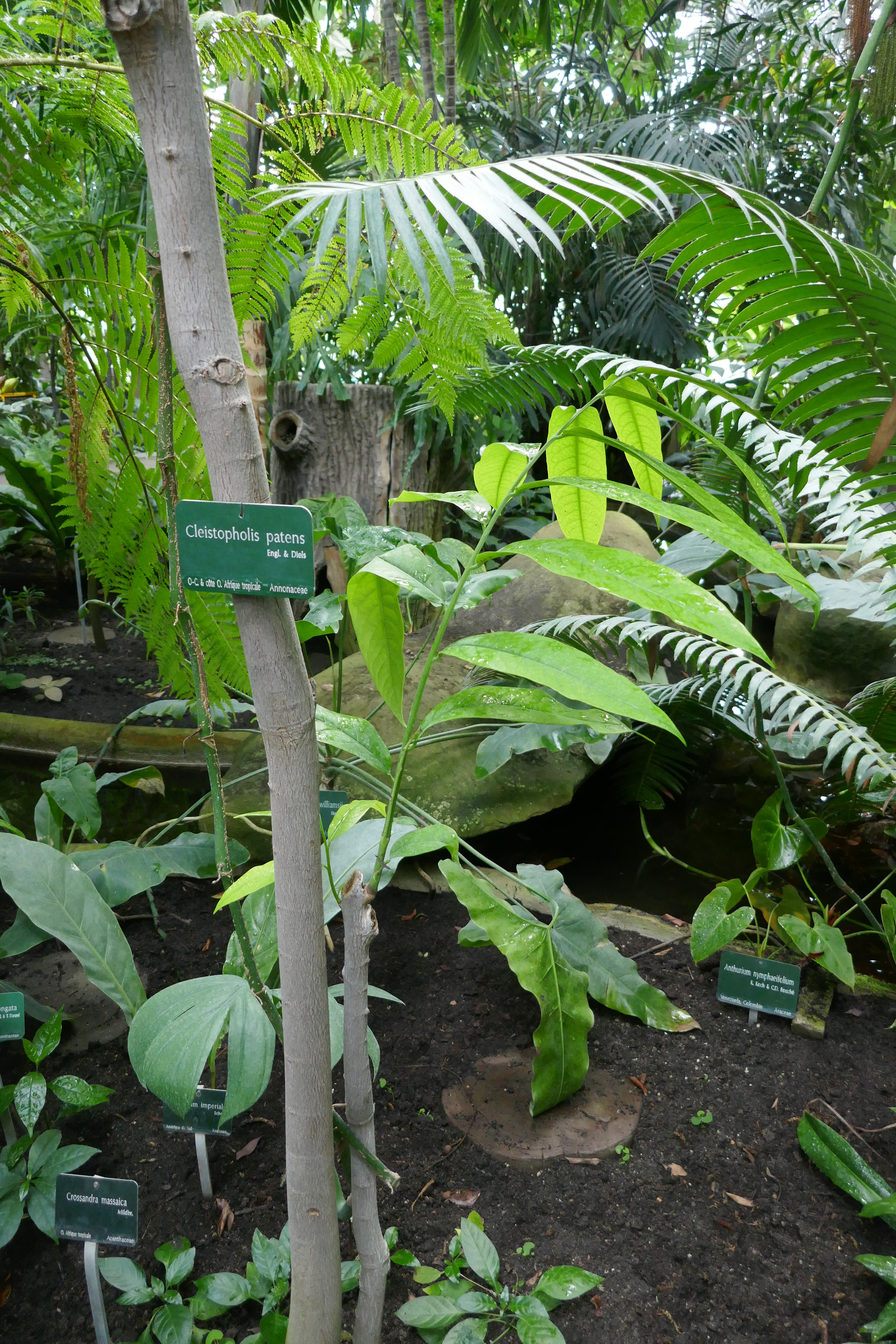 Cleistopholis patens Engl. & Diels Annonaceae. O-C & côte O. Afrique tropicale. Serres tropicales du Jardin des Plantes de Paris